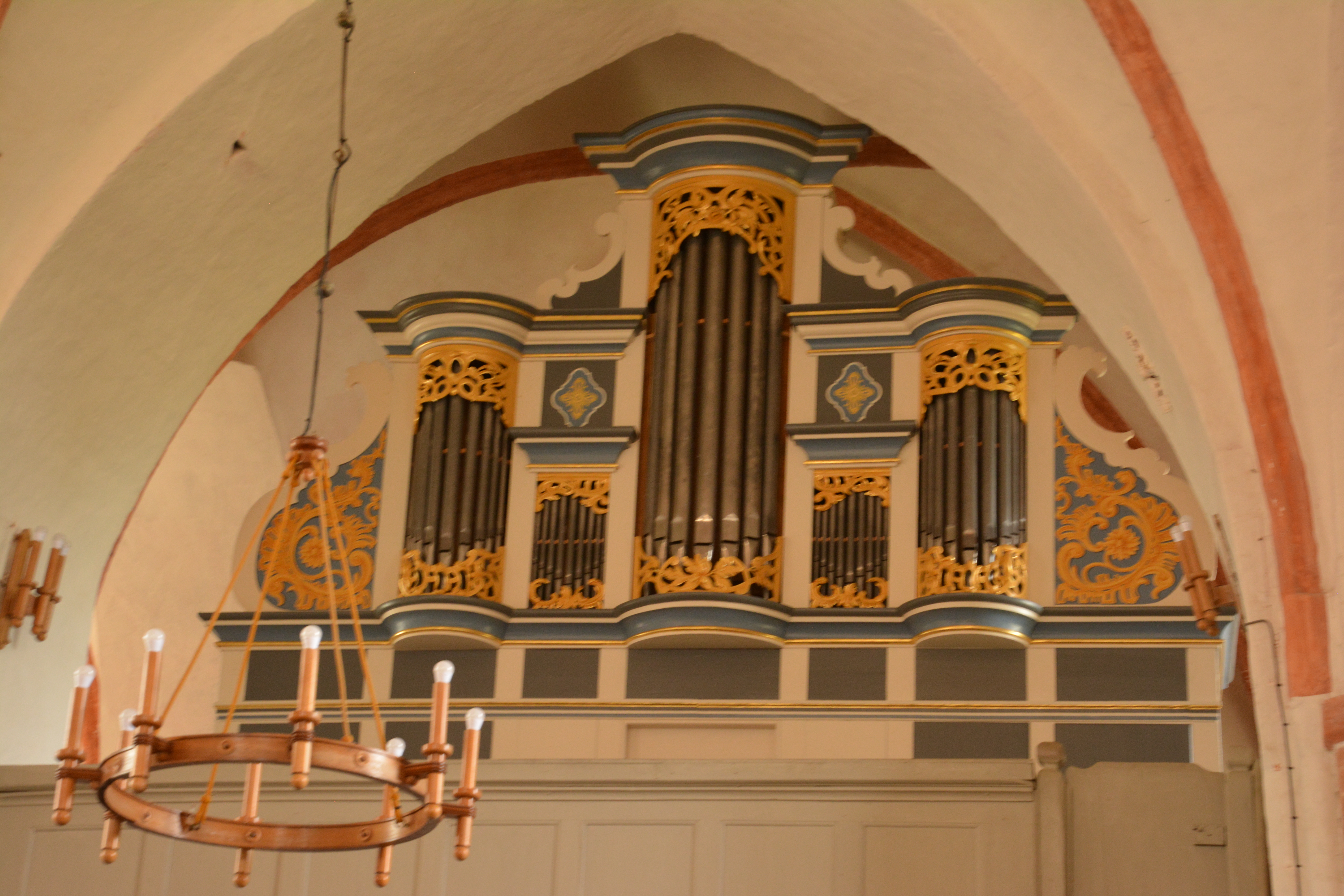 Dorfkirche Saal Orgelprospekt